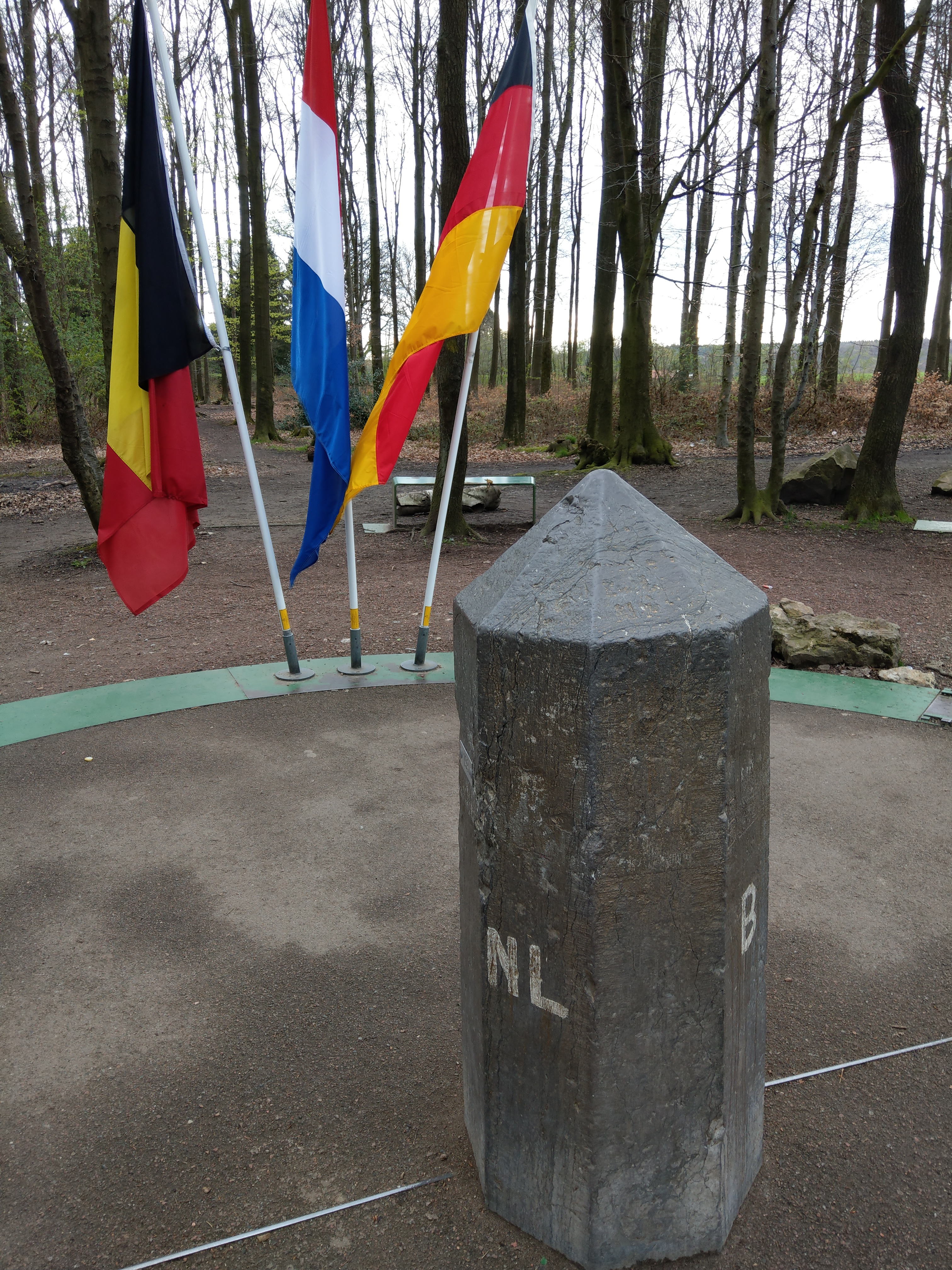 ezgfqdz